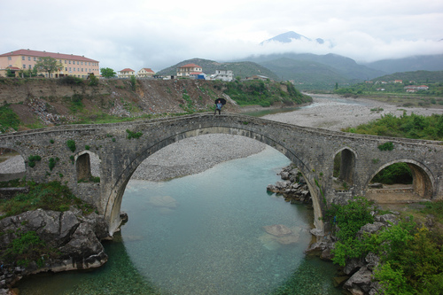 Boks, Albania